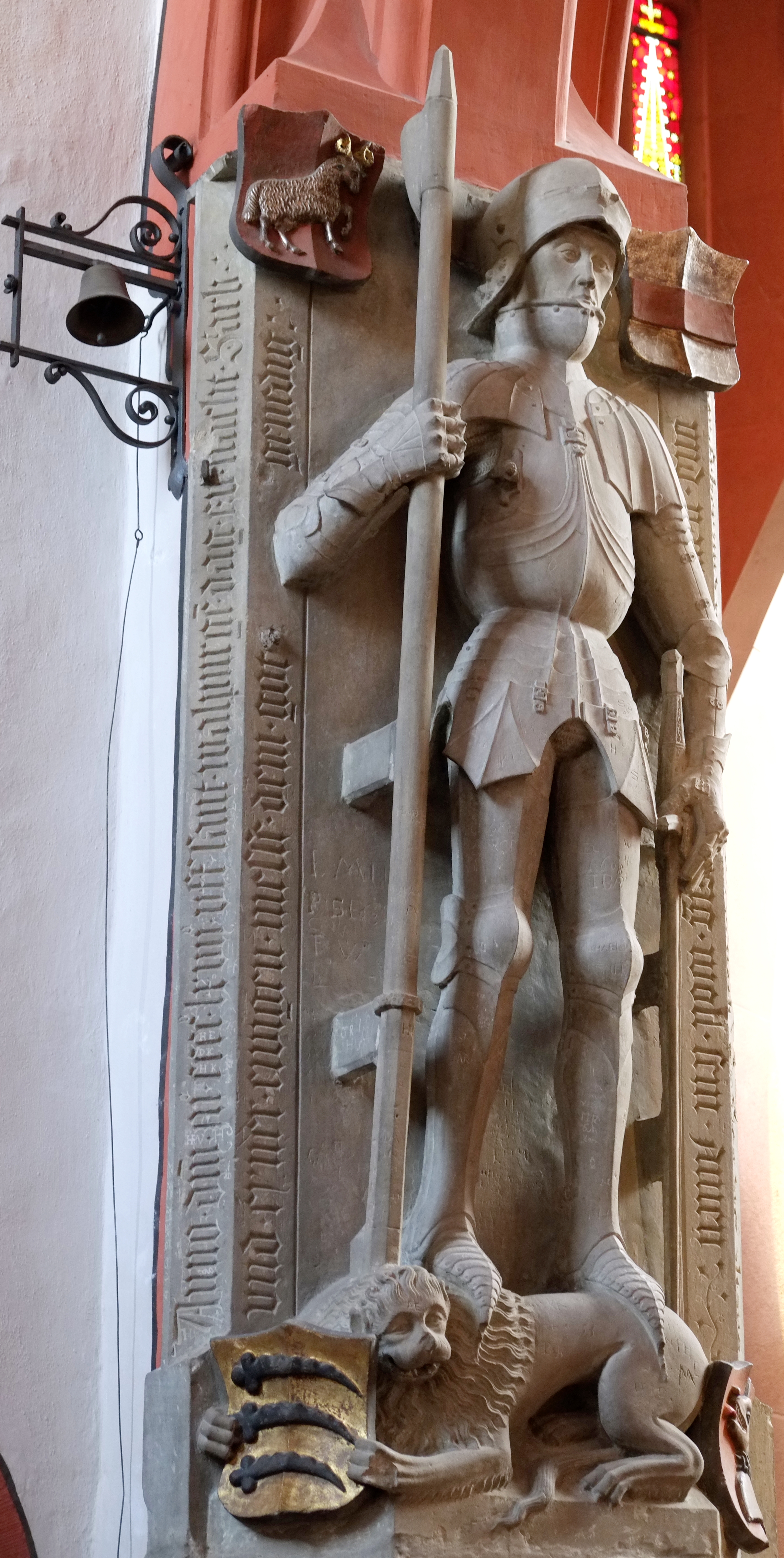 Epitaph für Jörg Veit von Rieneck († 25. Februar 1467) in der katholischen Pfarrkirche St. Andreas in Karlstadt im Main-Spessart-Kreis (Bayern, Deutschland)